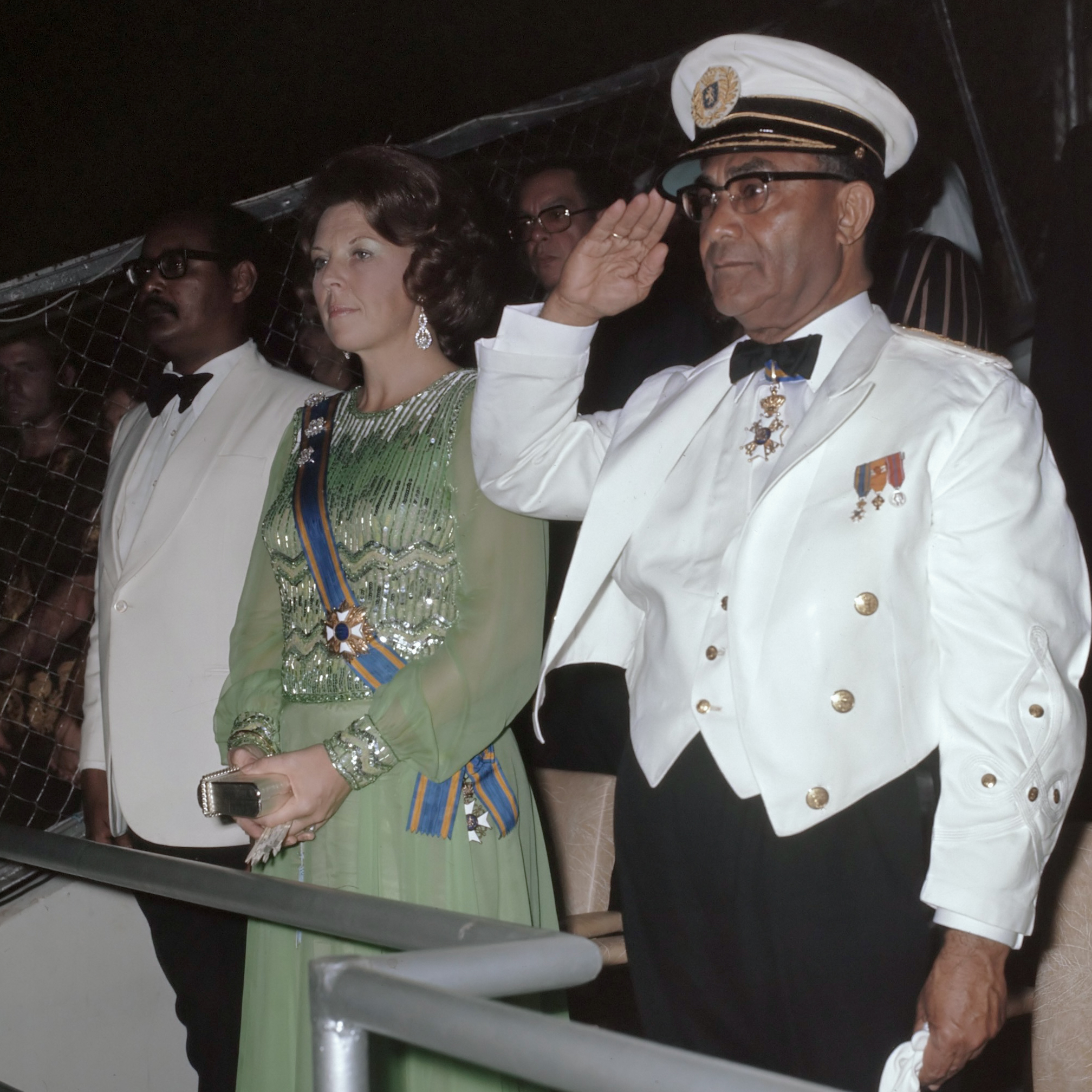 Aankomst Prinses Beatrix en Prins Claus in Paramaribo en verblijf, Prinses Beatrix en Prins Claus inspecteren erewacht in Paramaribo; vlnr Arron, Beatrix